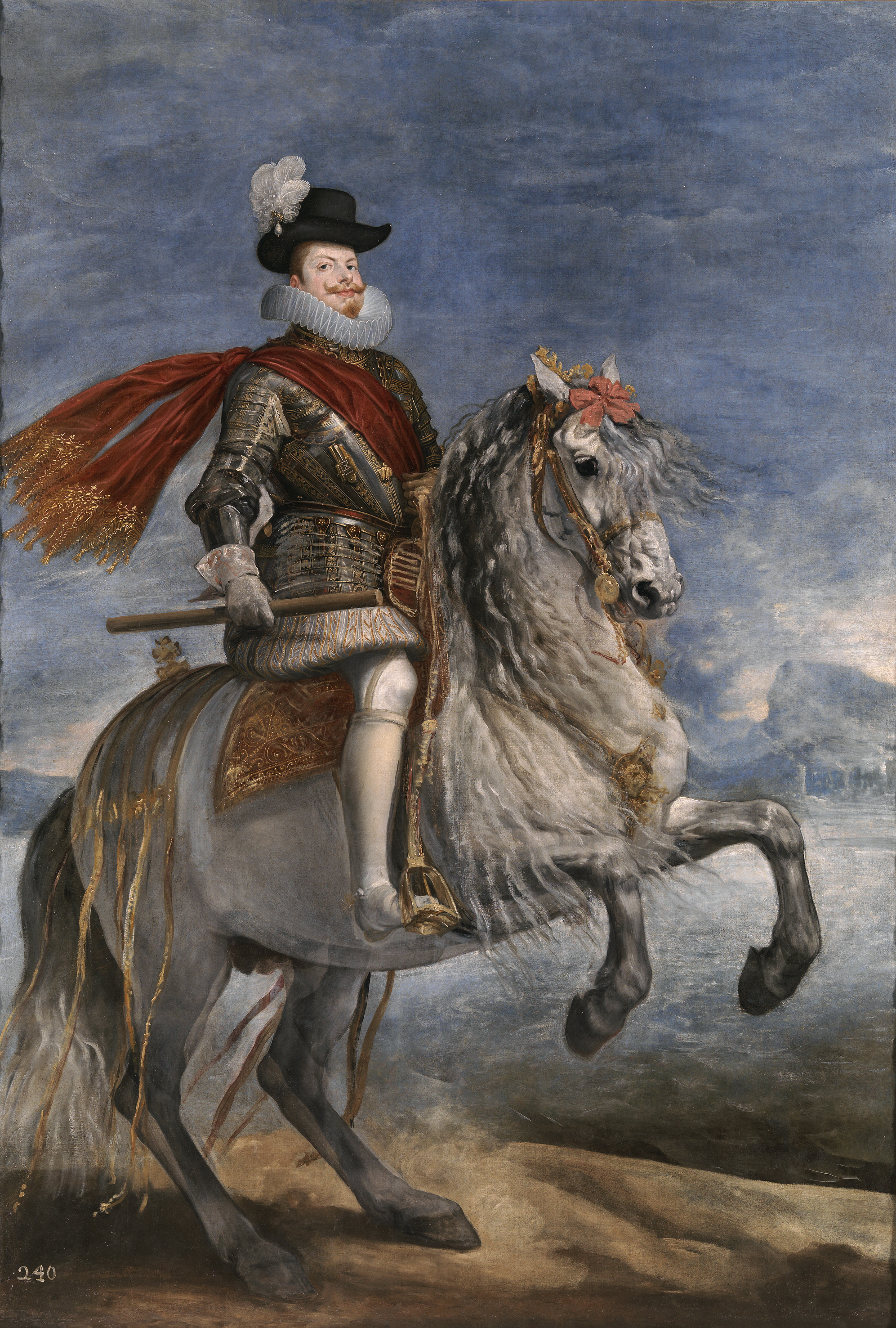 Retrato ecuestre del rey Felipe III de España (1578-1621), que fue hijo del rey Felipe II de España y de la reina Ana de Austria.